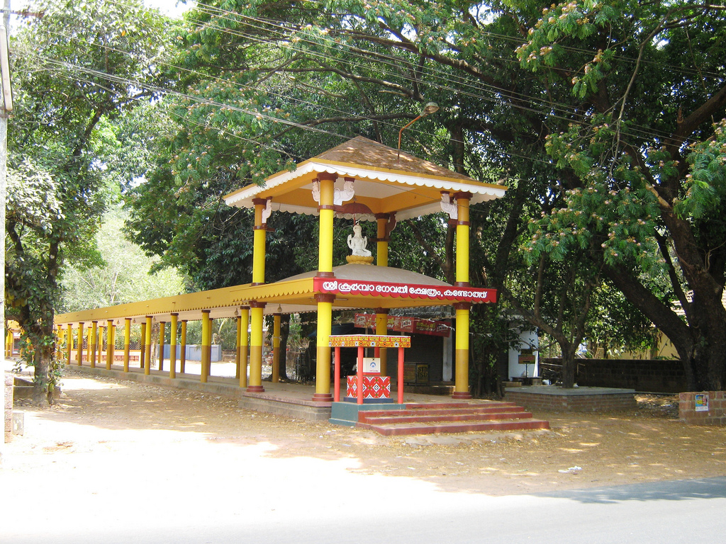 Payyannur, India.